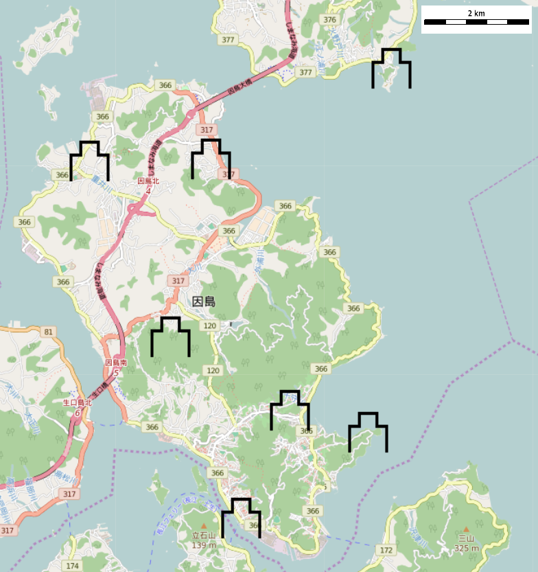 2016年広島県因島の地図に村上水軍の主な城を表記したもの This map may be incomplete, and may contain errors. Don't rely solely on it for navigation.